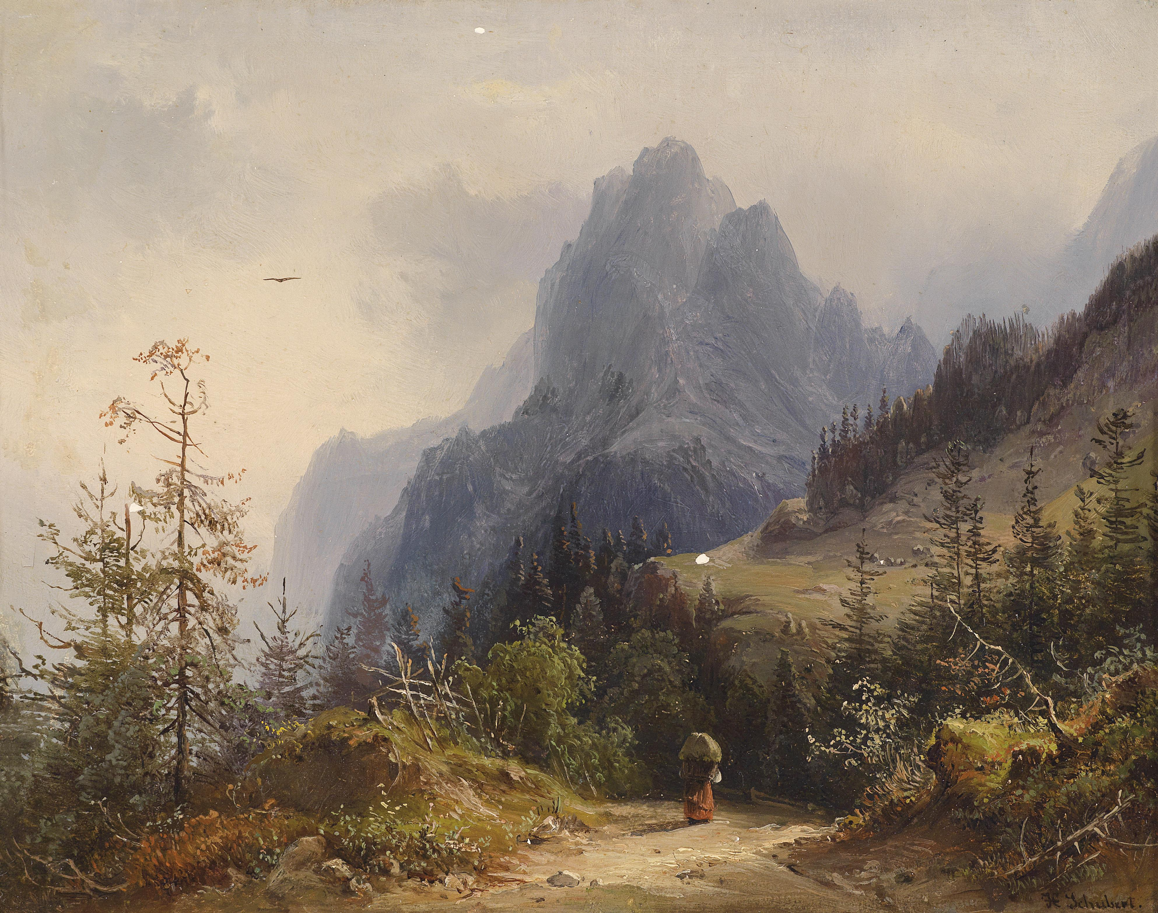 Großes Mühlsturzhorn in den Berchtesgadener Alpen